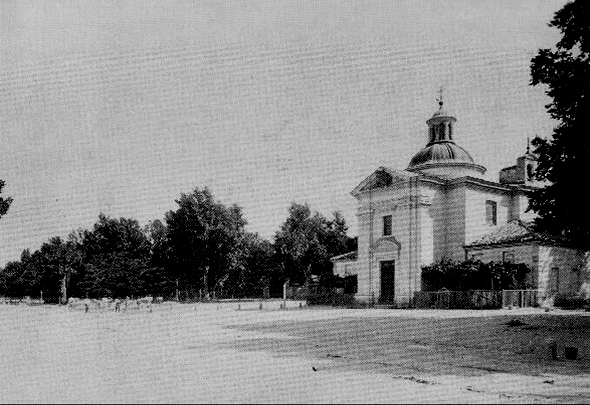 Exterior de la Ermita de San Antonio de la Florida. Construída en 1797 y monumento nacional desde 1905. Goya pintó los frescos de la cúpula. En 1928 se construyó una réplica para el culto, evitando con ello que el humo de la velas los deteriorase. De esta forma, la ermita original se destinó exclusivamente a museo y panteón de Goya.